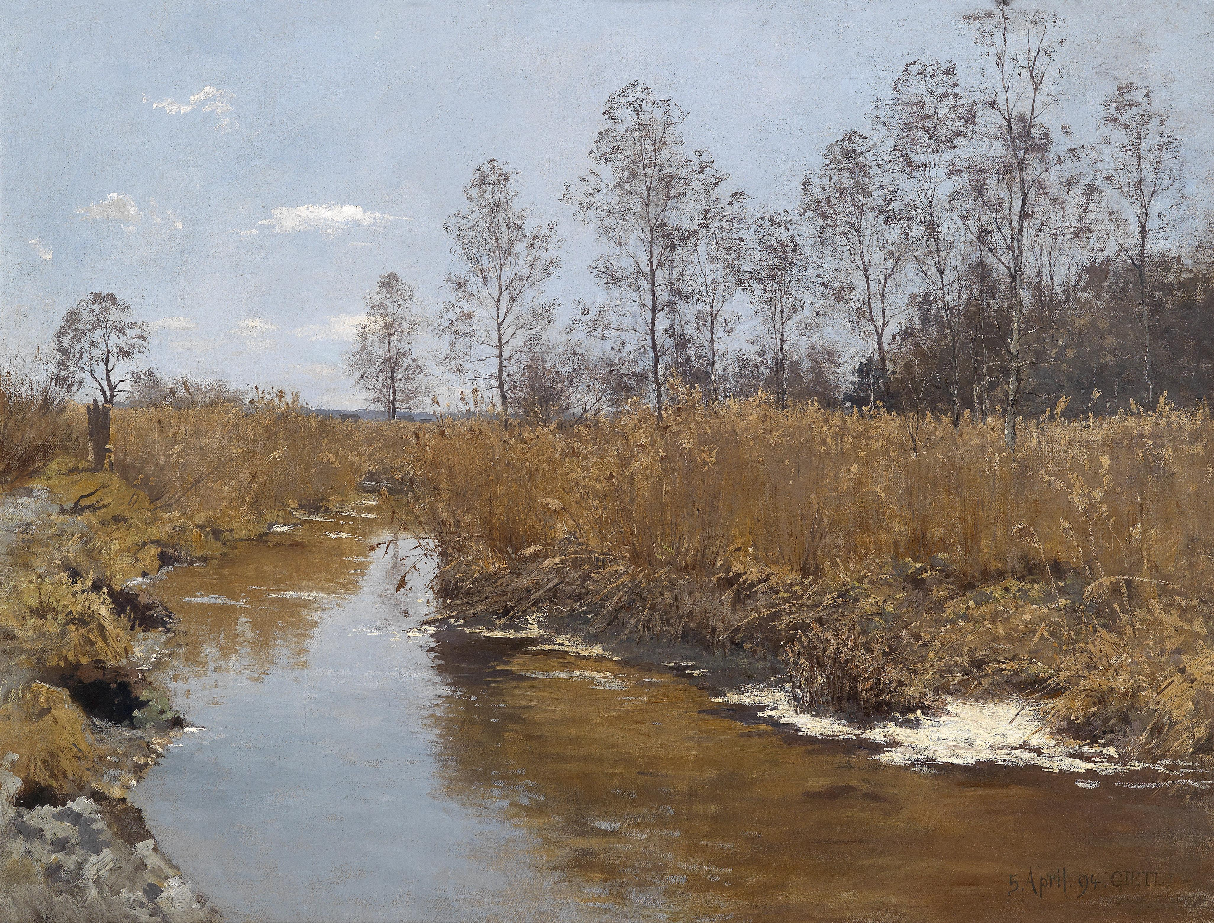 Bachlandschaft im Frühling, signiert, datiert Gietl 5. April (18)94, Öl auf Leinwand, 60 x 81 cm